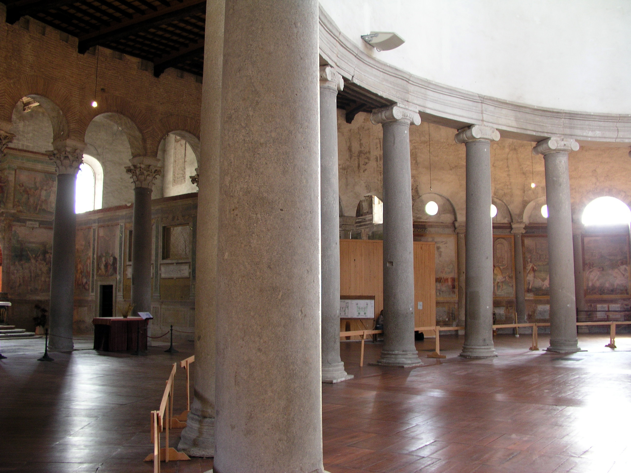 san stefano rotondo, rome (468-83 AD)